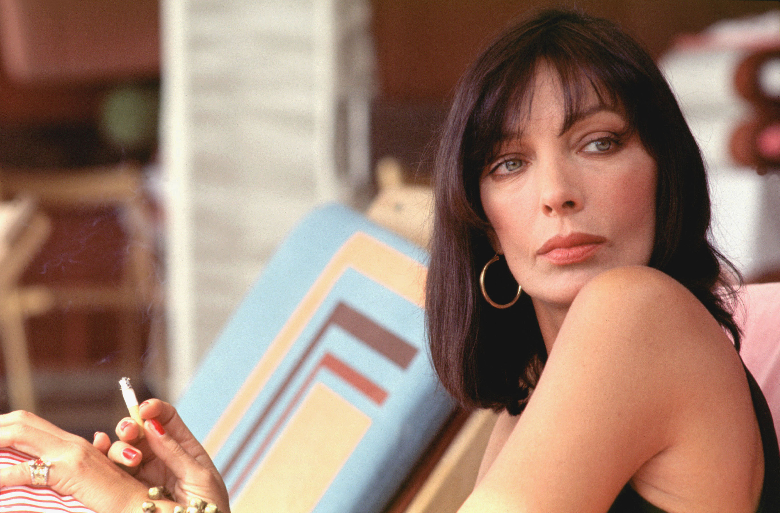 Marie Laforêt alla Mostra del cinema di Venezia del 1994